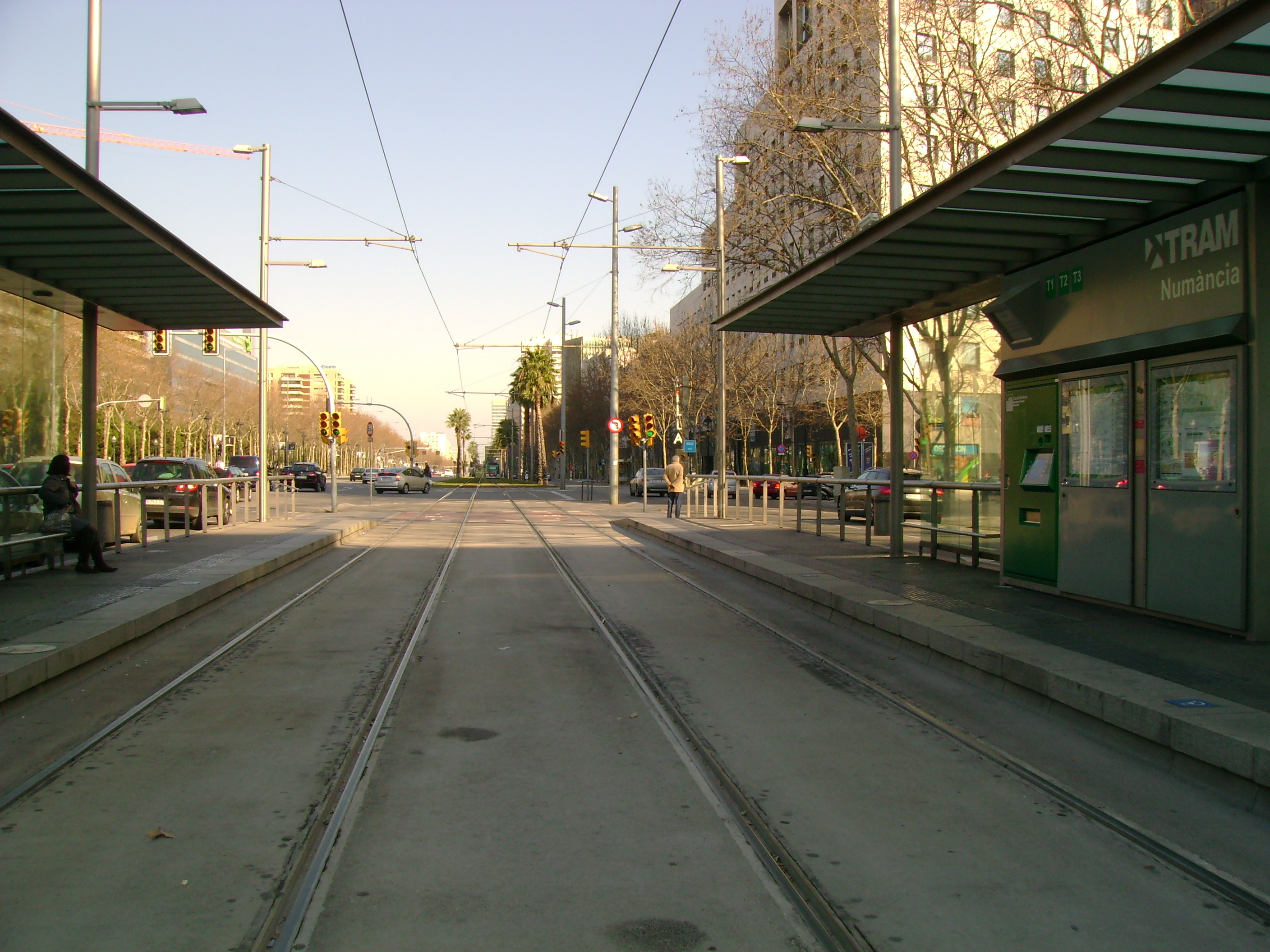 Foto capturada per la meva càmara a l'estació de Numància (Trambaix).